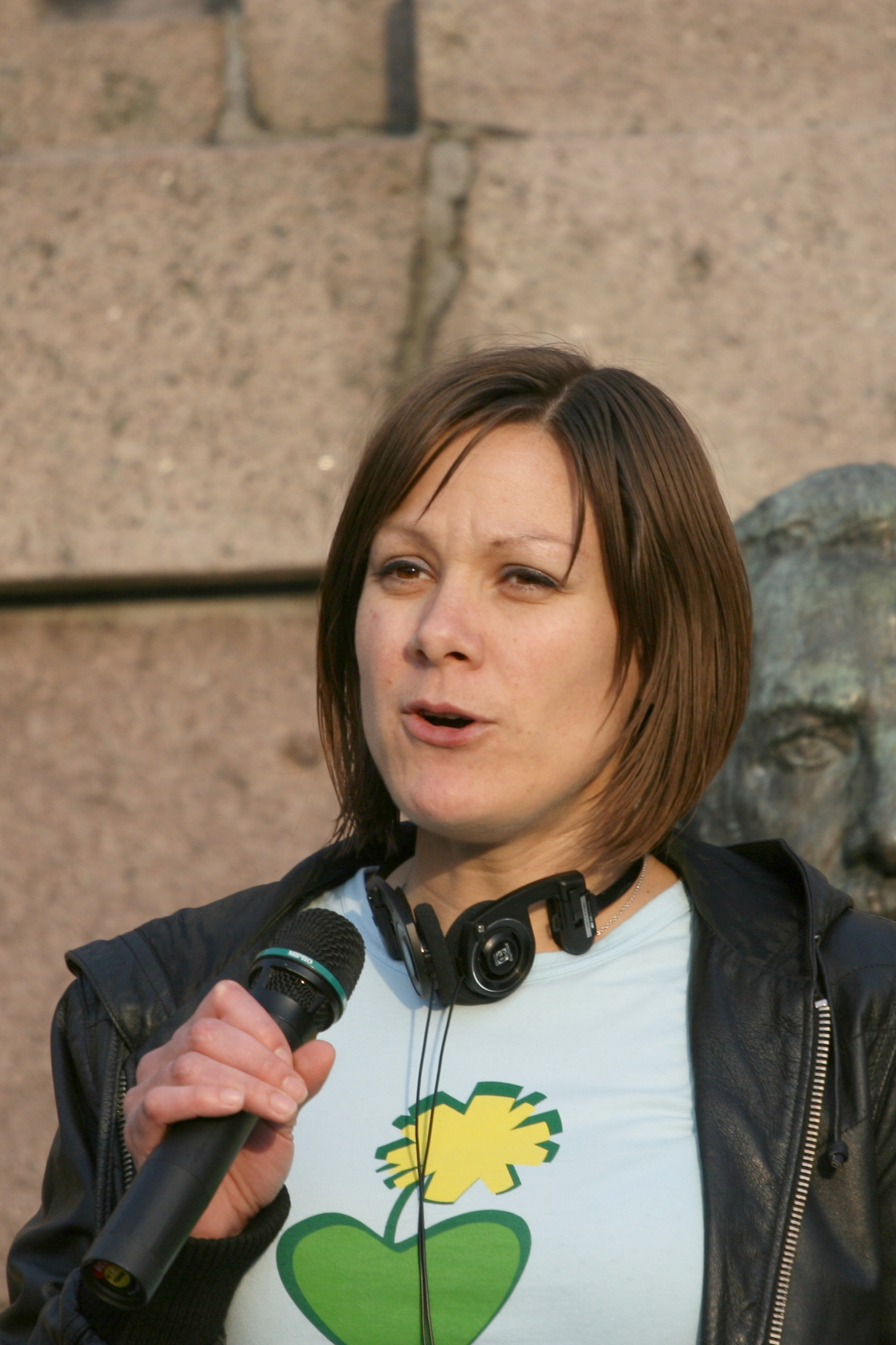 Hanna Elise Marcussen (Miljøpartiet De Grønne) under en demonstrasjon for et fritt Internett utenfor Stortinget 29. april 2009.